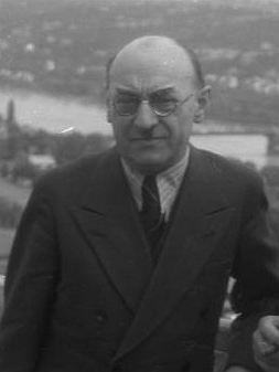 Title: Koblenz, "Rittersturz-Konferenz", Wohleb, Haberer People in the image: Wohleb, Leo: Staatspräsident von Süd-Baden, CDU, Gesandter in Portugal, Bundesrepublik Deutschland * Haberer, Hanns Dr.: 1890-1967, Minister für Wirtschaft und Finanzen in Rheinland-Pfalz, CDU, Bundesrepublik Deutschland Factual corrections and alternative descriptions are encouraged separately from the original description. Additionally errors can be reported at this page to inform the Bundesarchiv. Original historic description: Ministerpräsidenten-Konferenz der Länder der 3 Westzonen Deutschlands auf dem Berghotel Rittersturz in Koblenz (v.l.n.r.: Leo Wohleb, Dr. Hanns Haberer) 8.-10.7.1948